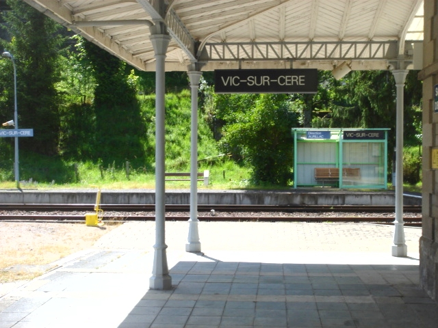 Gare de Vic-sur-Cère (15)